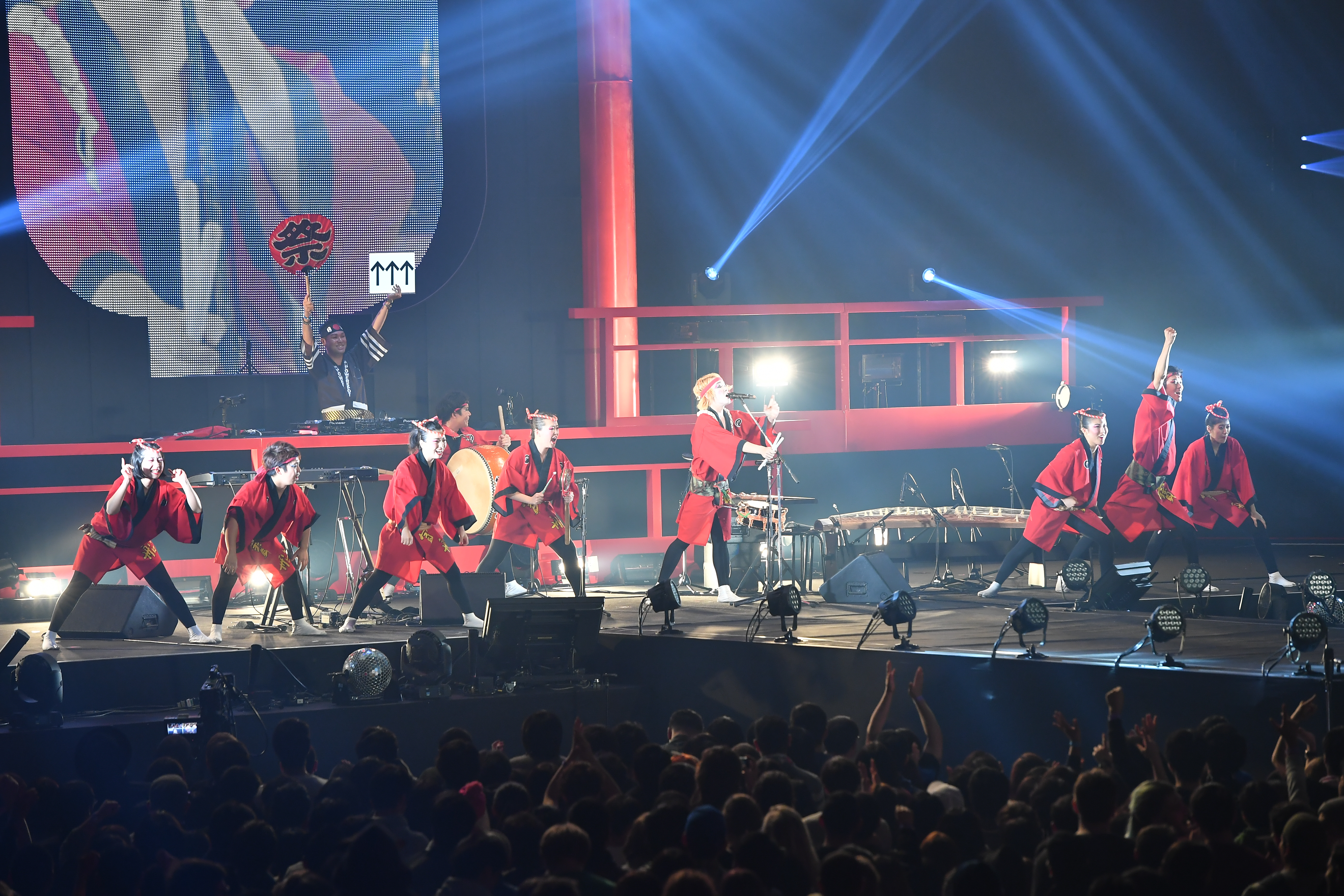 「もしもしにっぽんFESTIVAL2016」にてDAISHIDANCEとのスペシャルユニットを披露。